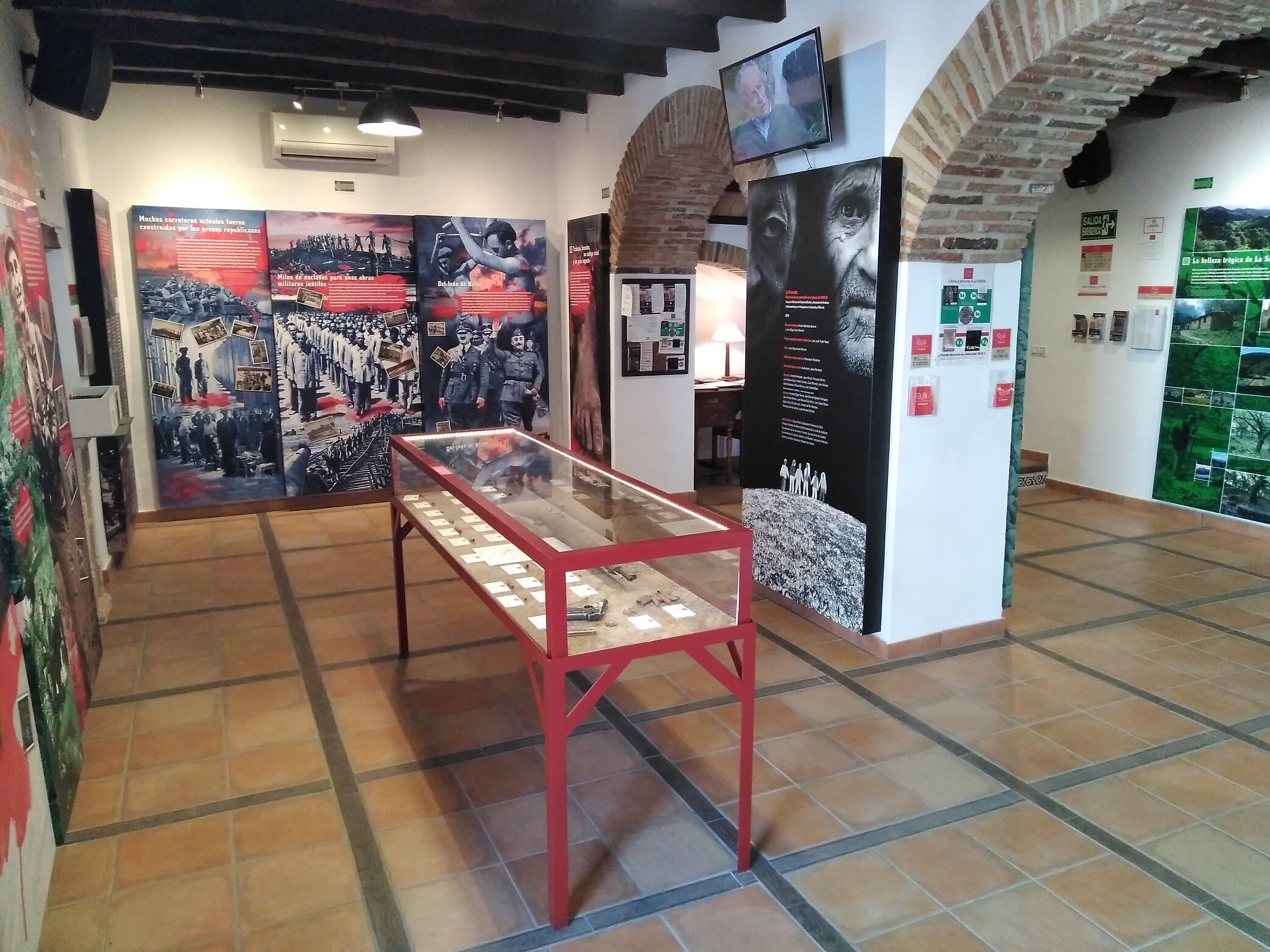 interior de la Casa de la Memoria La Sauceda en Jimena de la Frontera (España)